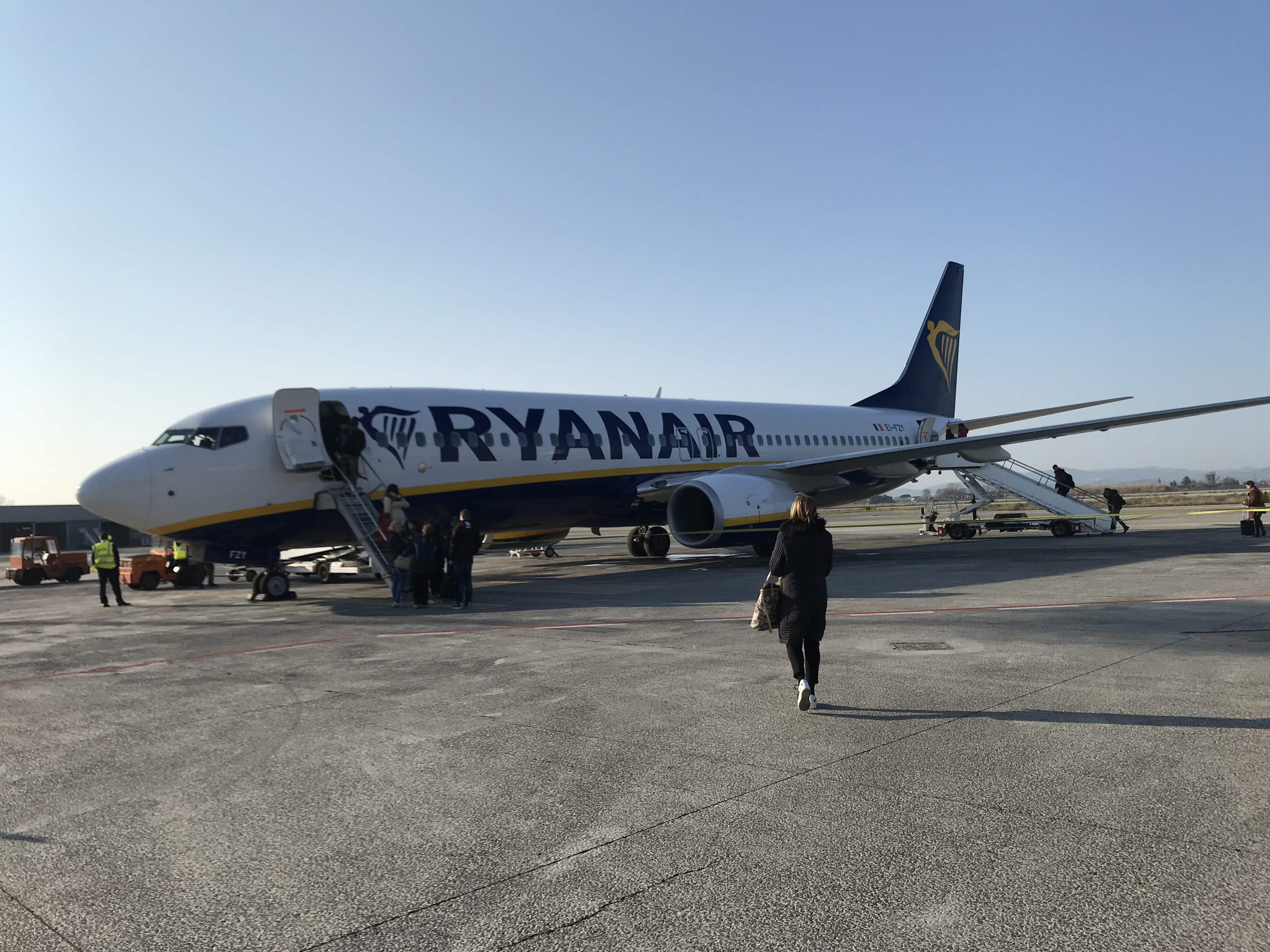 FR6040 flight to Warsaw departing from Rimini airport